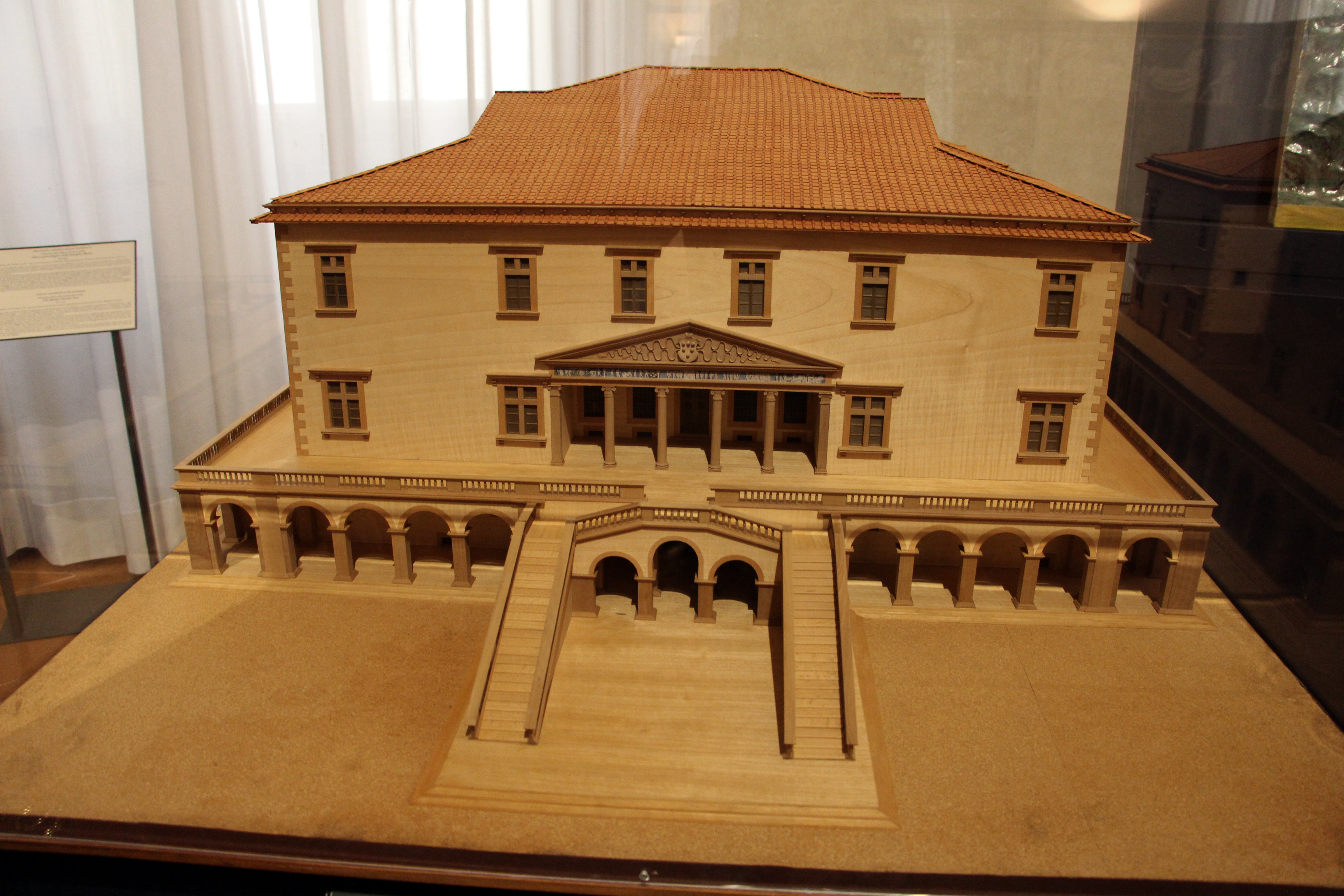 Villa medicea di Poggio a Caiano - MIBAC The making of this document was supported by Wikimedia CH. (Submit your project!) For all the files concerned, please see the category Supported by Wikimedia CH. This is a photo of a monument which is part of cultural heritage of Italy.